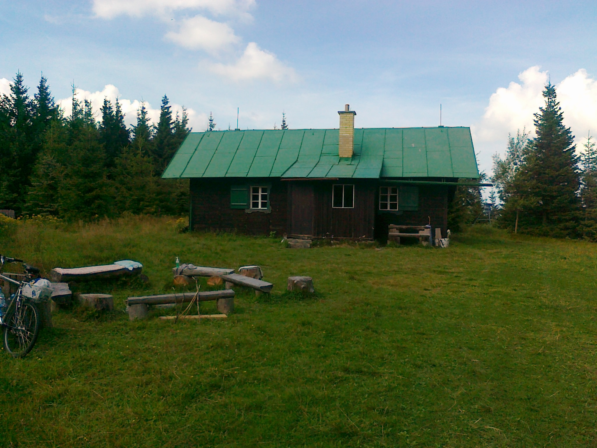 Maloklínská chata na szczycie góry Malý Klín